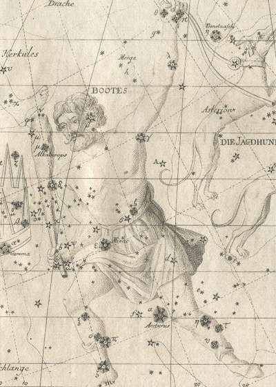 Das Sternbild Bootes aus dem Sternatlas von Johann Elert Bode von 1782.